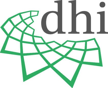 Logo Deutsches Historisches Institut in Rom